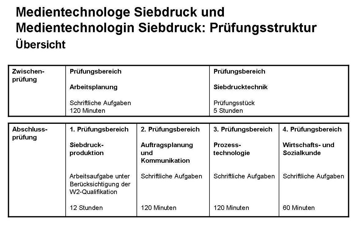 Übersicht der Prüfung im dualen Ausbildungsberuf Medientechnologe Siebdruck